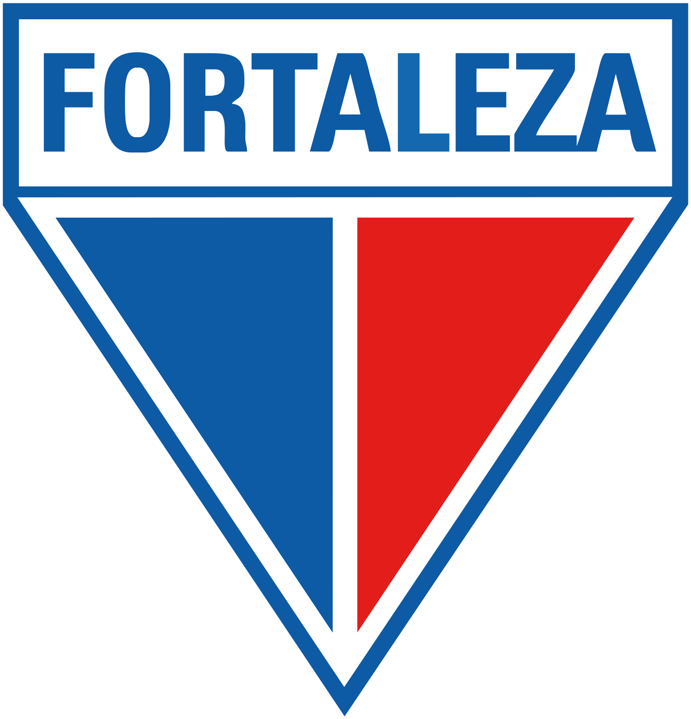 Escudo oficial do Fortaleza Esporte Clube